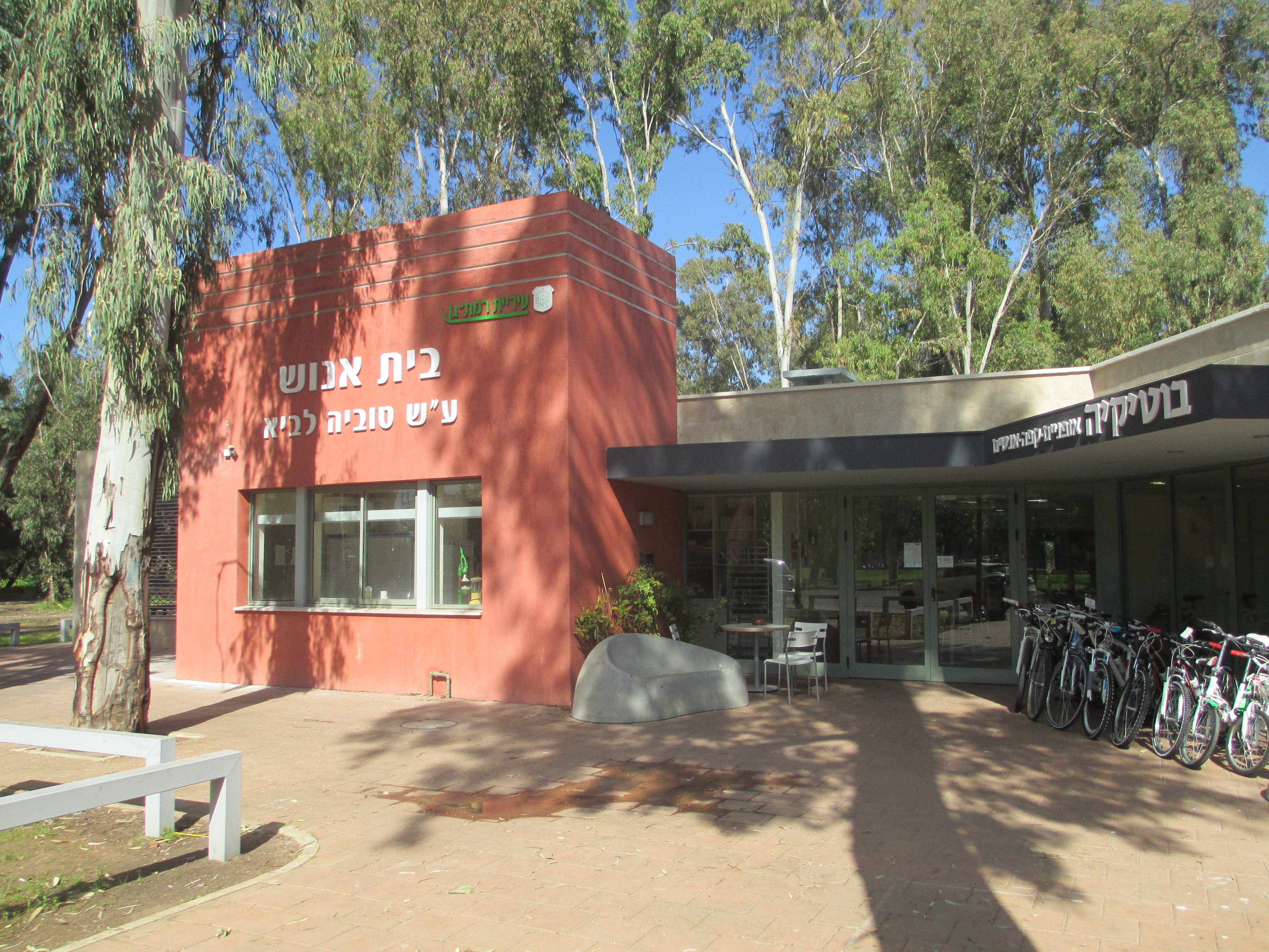 בית אנוש לשיקום חולי נפש ברמת גן